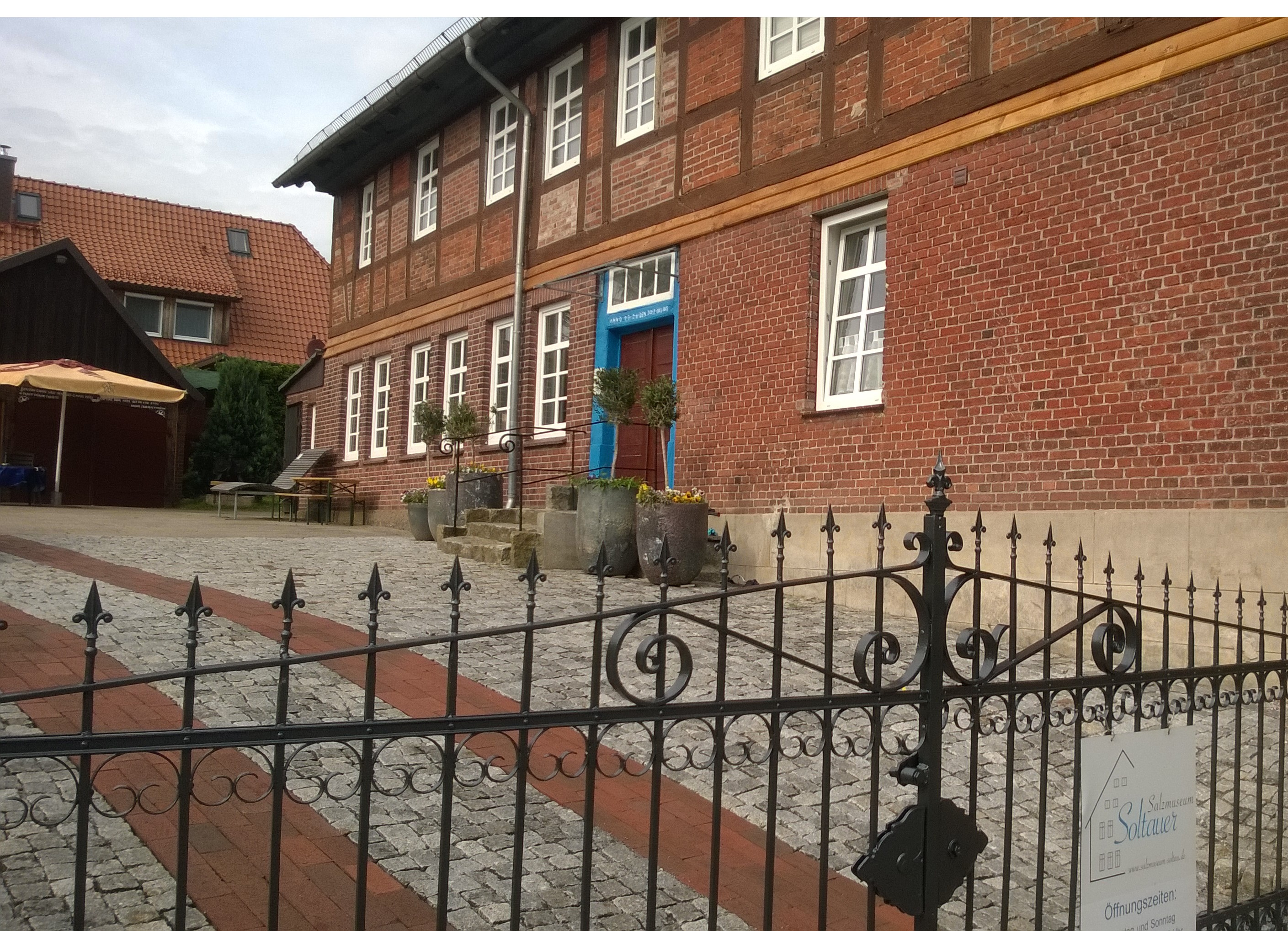 Eingang, Soltauer Salzmuseum, Bahnhofstraße 6.